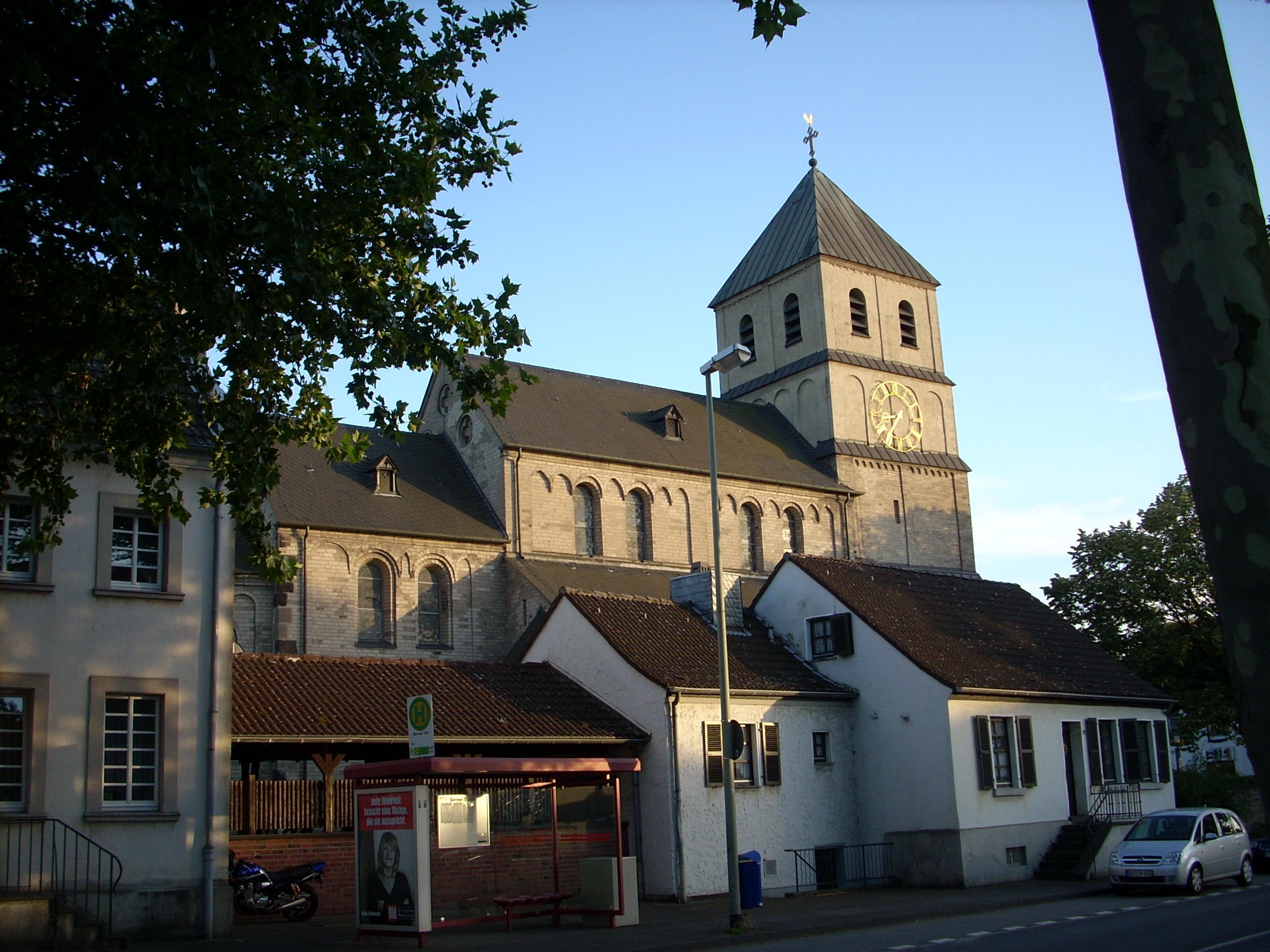 Die katholische Pfarrkirche St. Dionysius in Duisburg-Mündelheim aus dem Jahr 1221